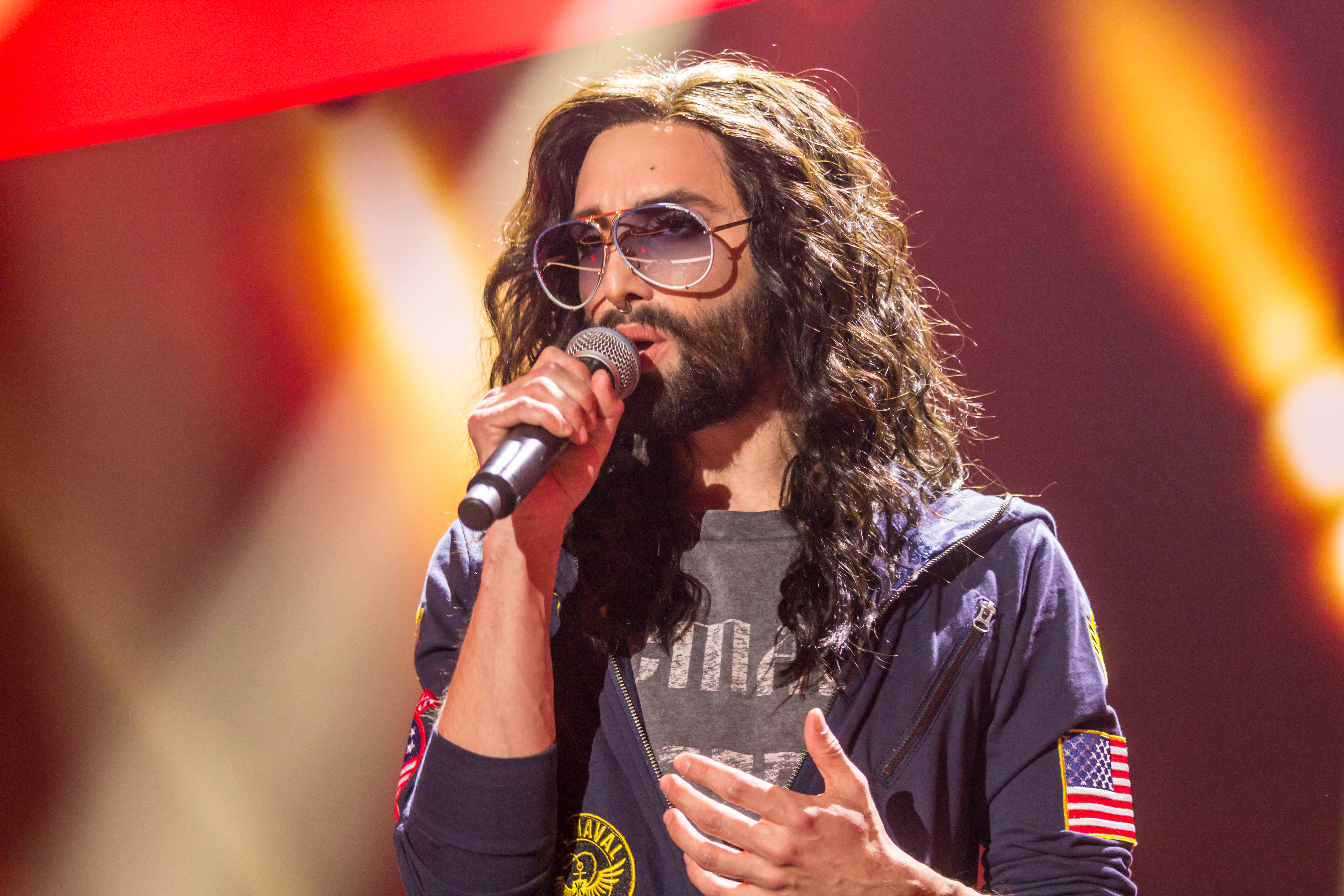 Unser Song 2017 - Generalprobe - Medley Ruslana, Nicole und Conchita